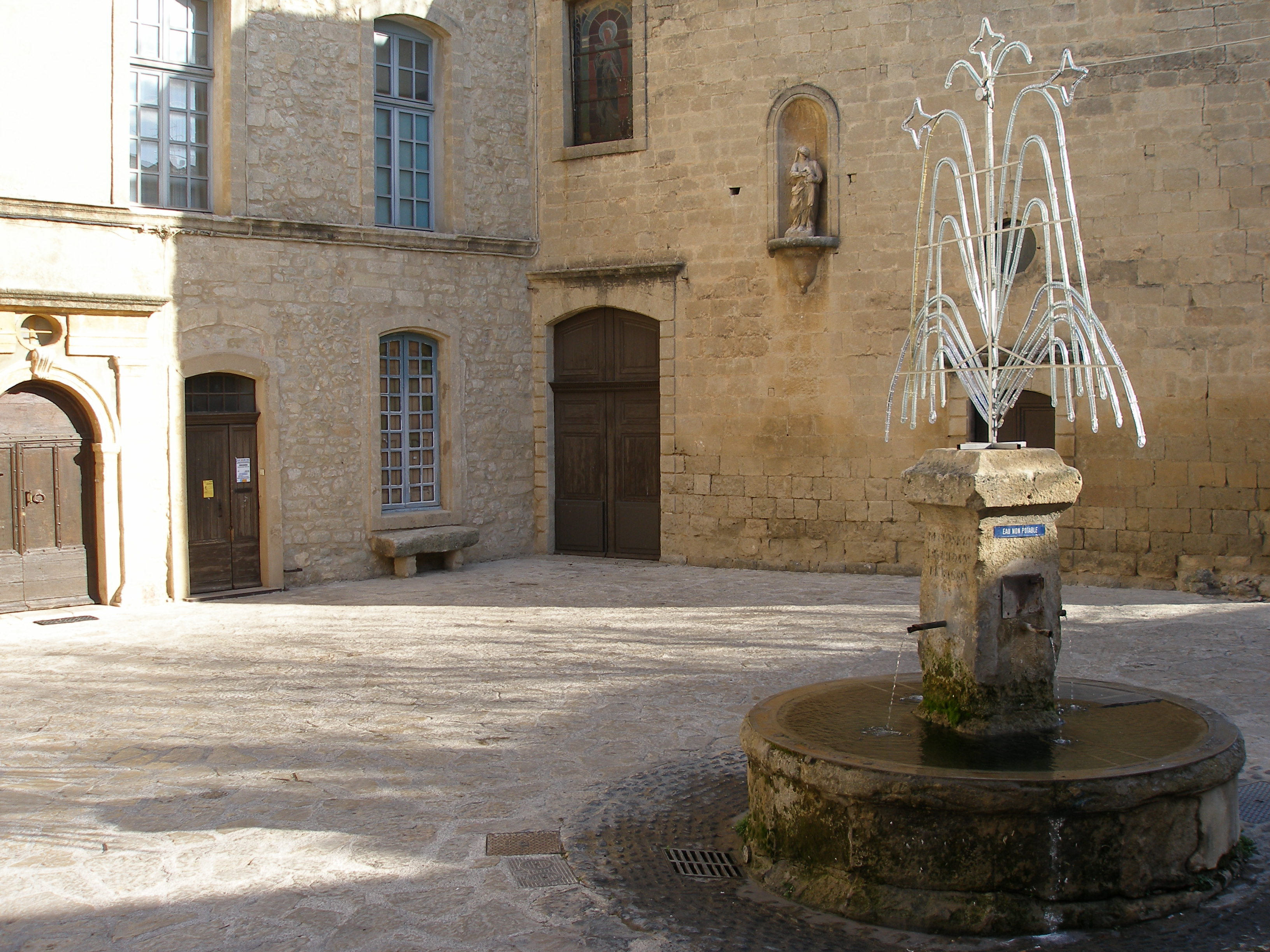 Fontaine sur la Place, à Grambois (Vaucluse)